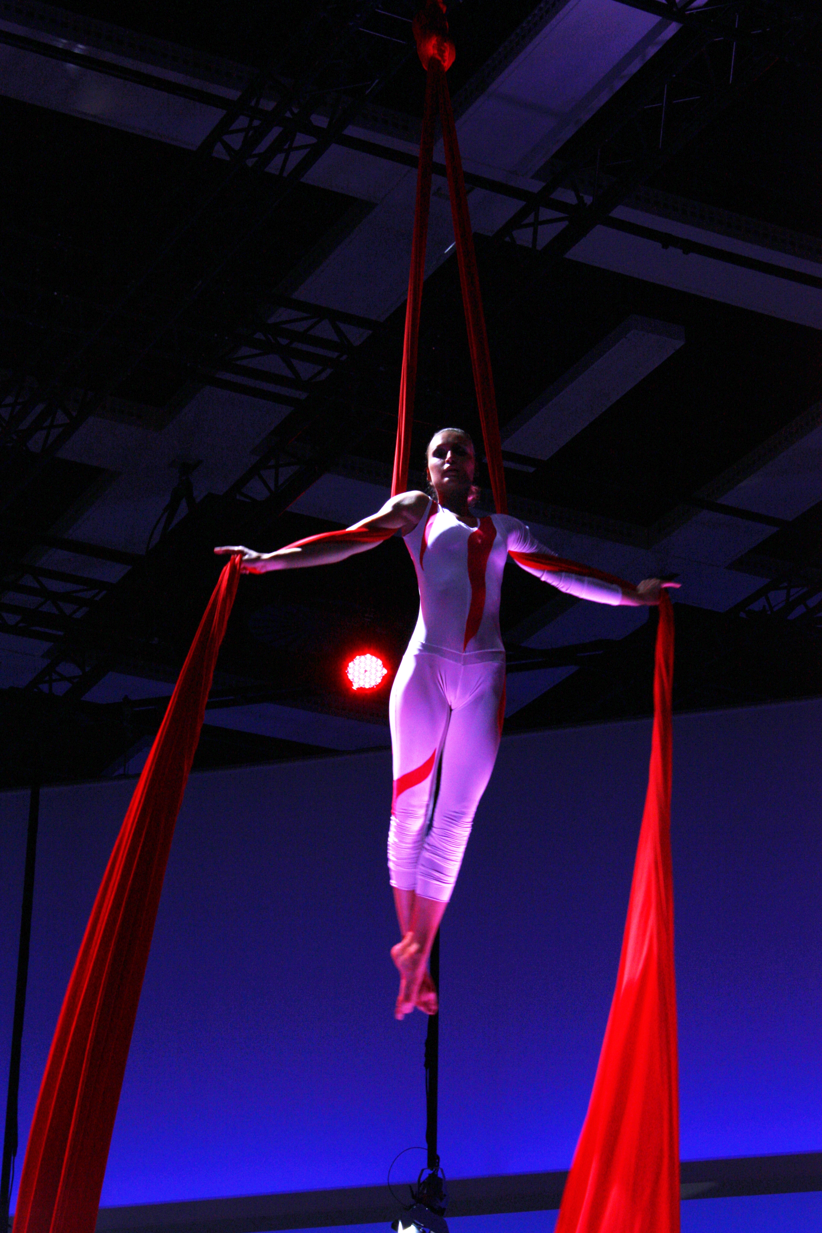 IFA 2010, Berlin